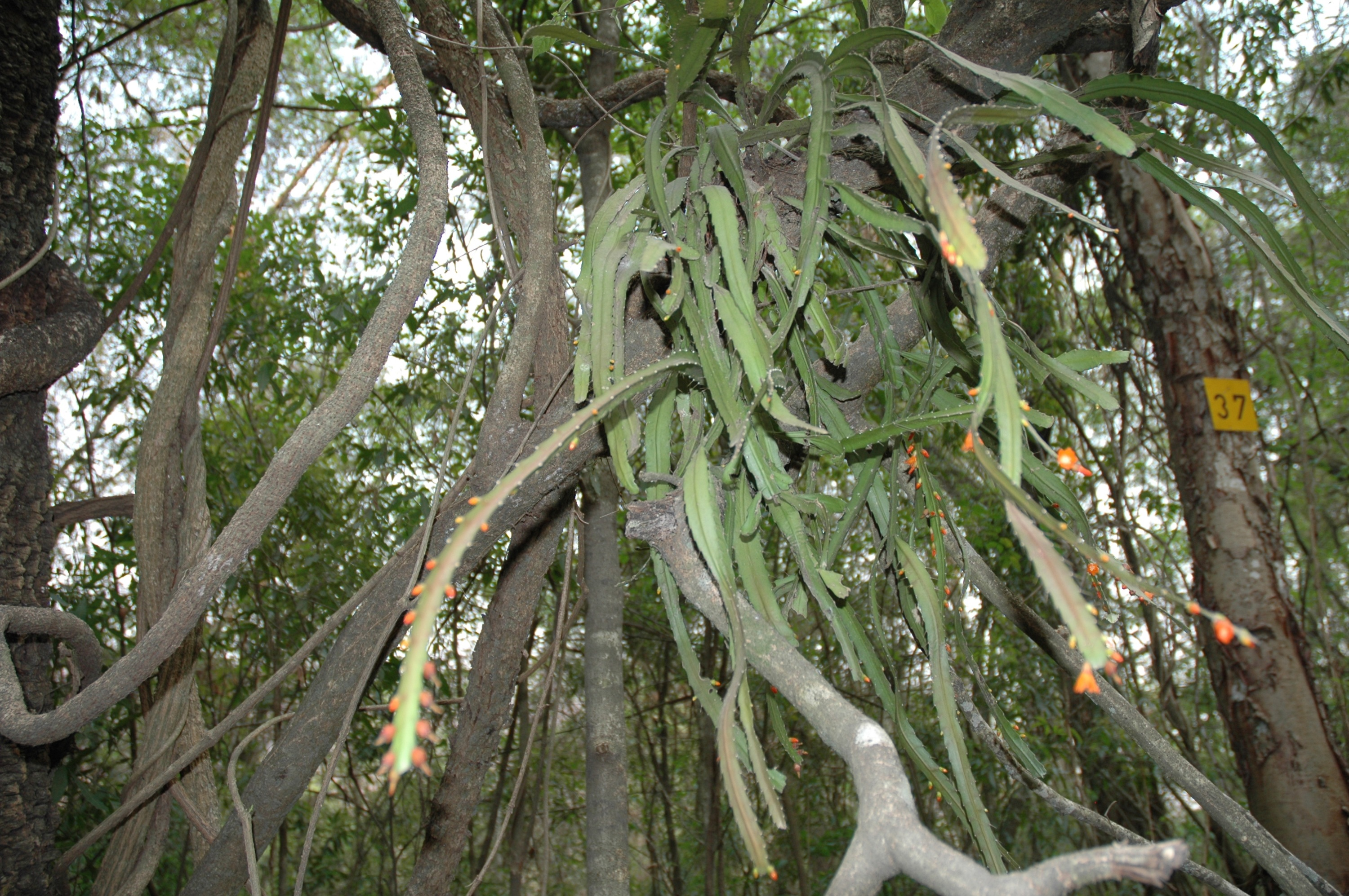 cf. Pfeiffera monacanthum (Cactaceae epifita) Parque Nacional Calilegua, Prov. Jujuy Parque Nacional Calilegua, Jujuy.